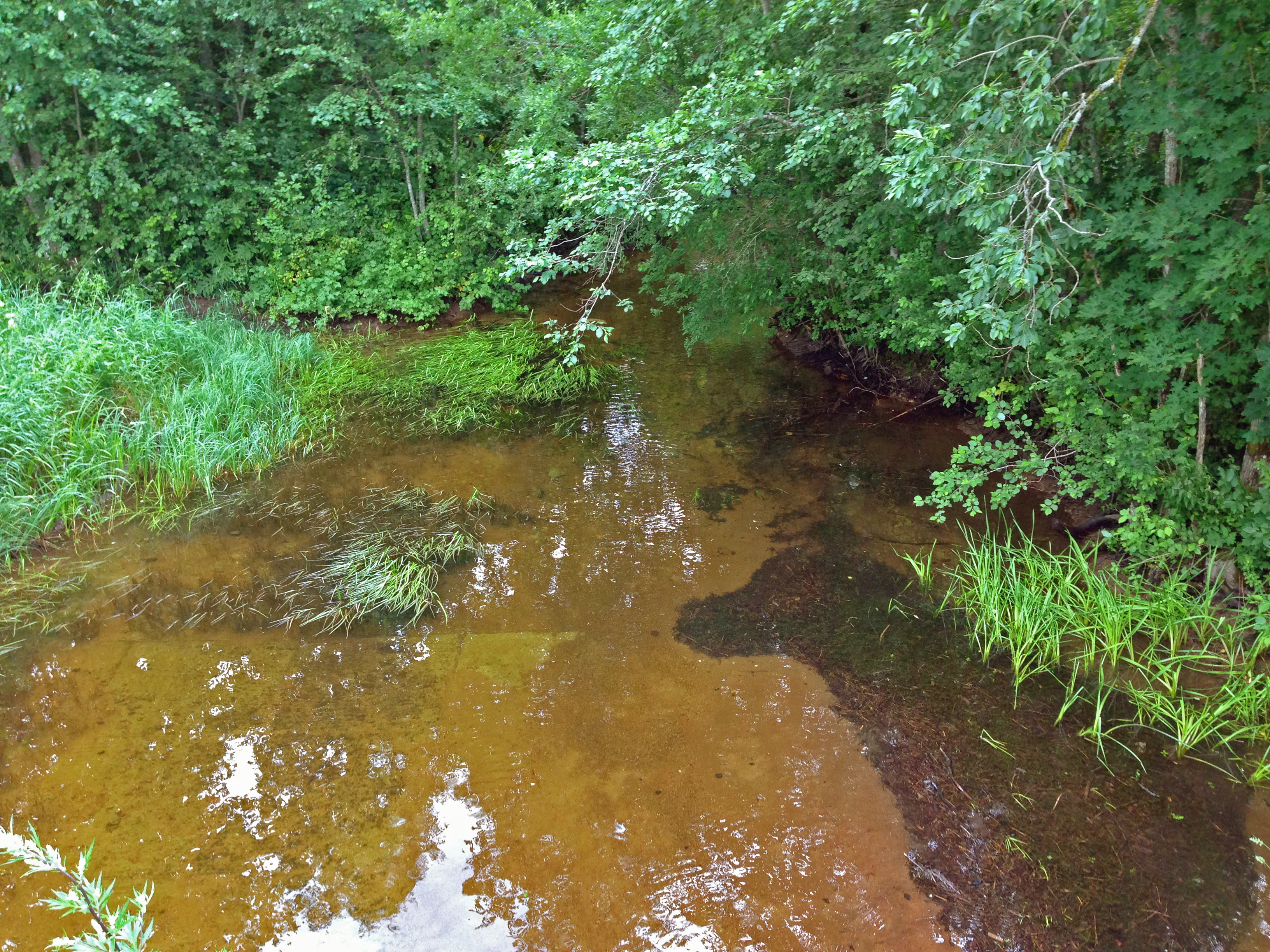 Река Сума недалеко от усадьбы Утешение.